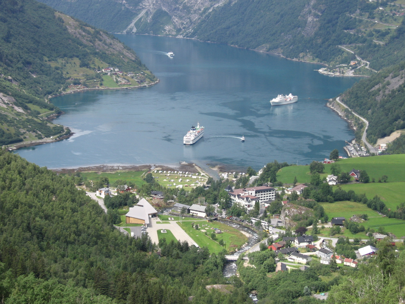 Widok na Fiord